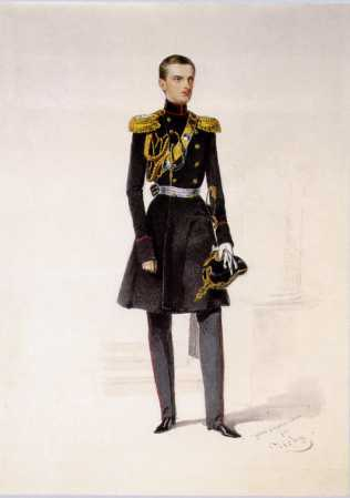 Великий князь Михаил Николаевич Внизу справа авторская надпись и подпись: print d’apres nature par Zichy Плотная бумага желтоватого цвета; гуашь, акварель, белила; наклеен на монтировочный лист с княжеской короной золотом вверху, над рисунком. 300 х 210 Инв. № ОР-39905 Великий князь Михаил Николаевич (1832-1909), младший сын императора Николая I. С 1852 г. и до конца жизни начальник артиллерийского технического снабжения; генерал-фельдцейхмейстер; шеф 2-й бригады Конной артиллерии; в 1863-1881 гг. генерал-фельдмаршал; наместник Кавказа и командующий 2-й Кавказской армией; в 1881-1905 гг. председатель Государственного совета. Листы из альбома “Офицеры лейб-гвардии Конной артиллерии 2-й легкой батареи”. 1852. Альбом включает 13 листов, вложенных в черную кожаную папку. Исполнен по заказу императрицы Александры Федоровны. Происхождение: пост, в Эрмитаж в 1929 через ГМФ; ранее собрание Зимнего дворца Литература: Алешина 1975, с. 189